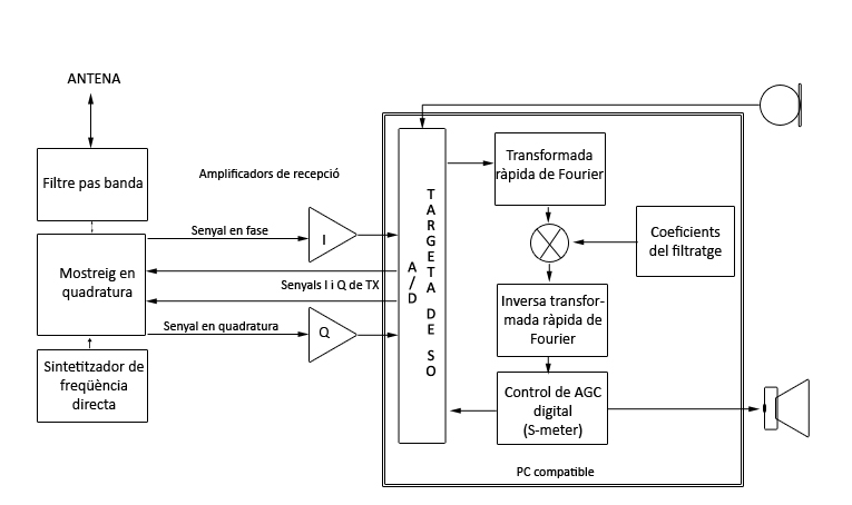 Arquitectura de la SDR utilitzant un PC amb una targeta de so.